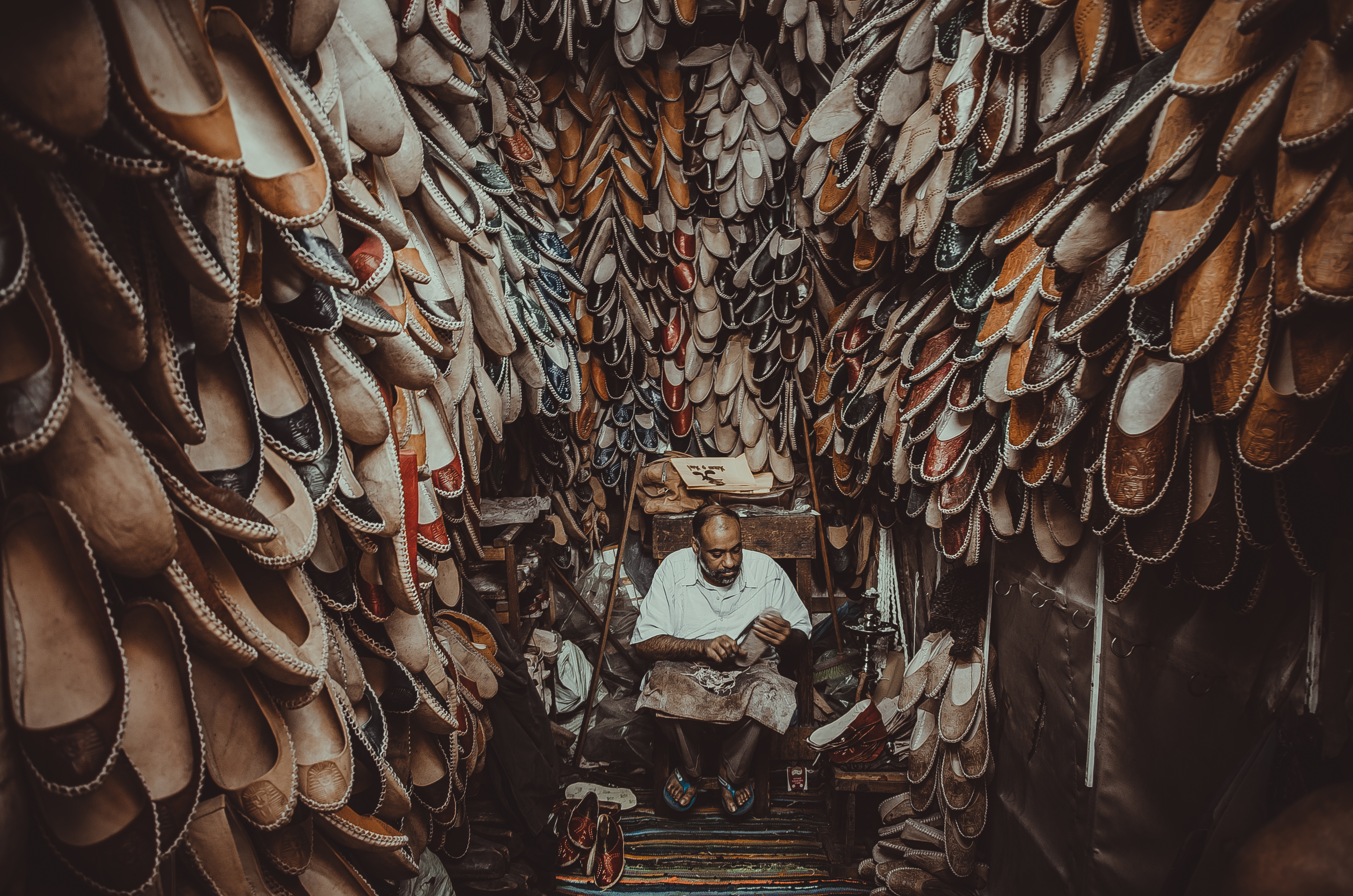 مصرى: عم جمال متخرج من كلية تجارة جامعة القاهرة ويعمل صانع احذيه في منطقة السيده زينب This is an image of "African people at work" from Egypt